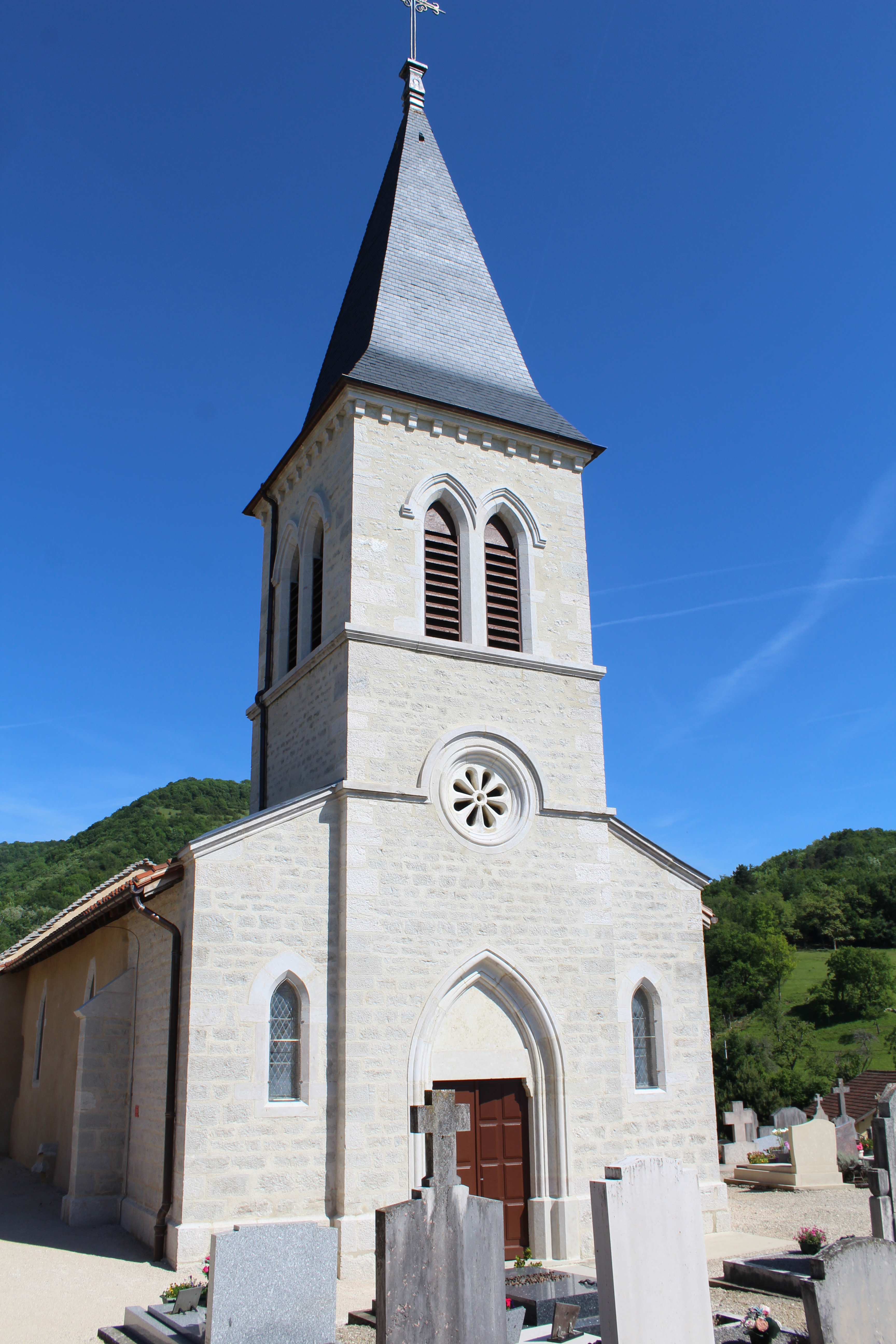 Église Saint-Laurent de Pressiat.